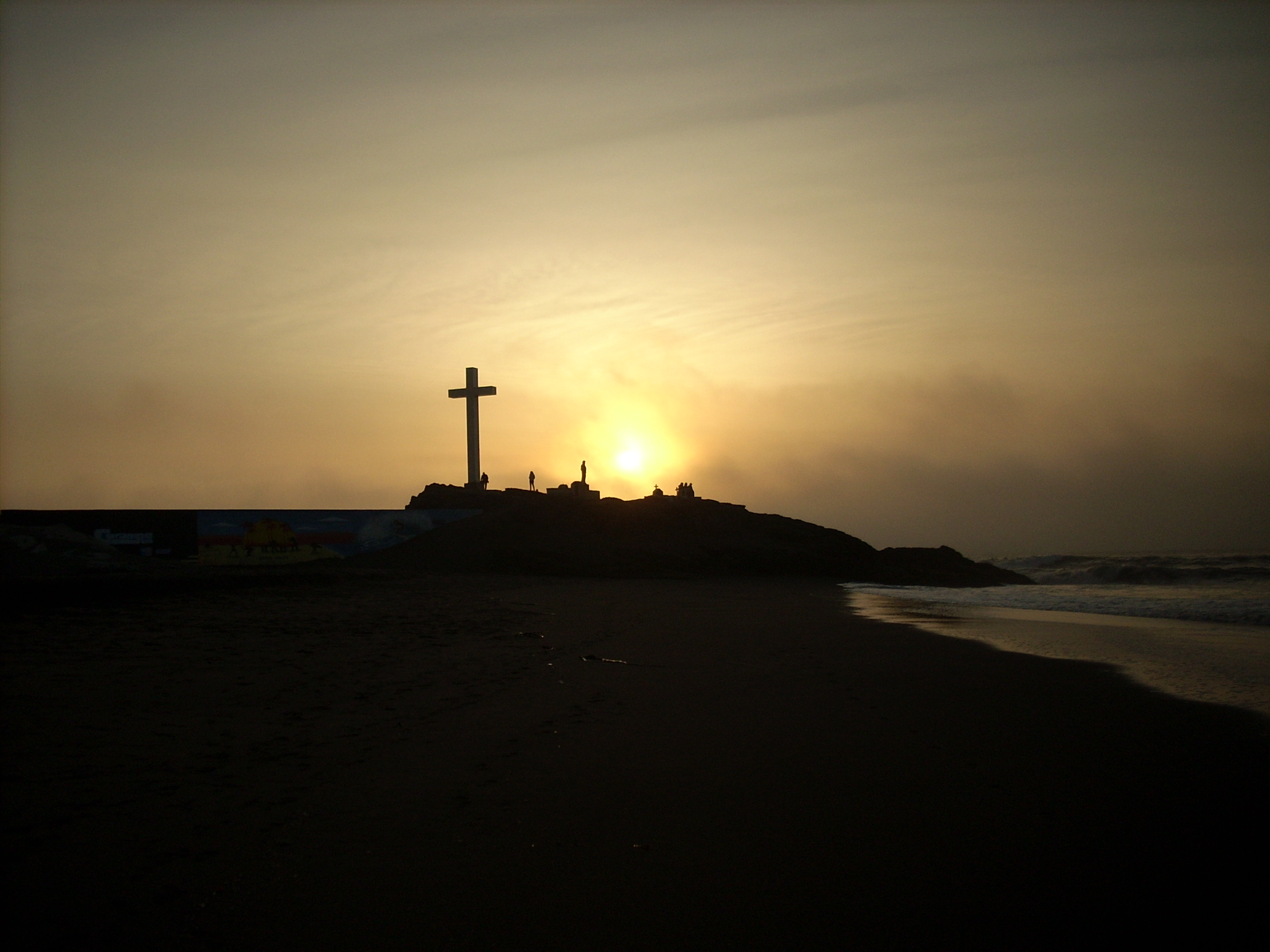 Puesta de Sol en Roca de San Pedro en la playa de Curanipe, VII región Chile